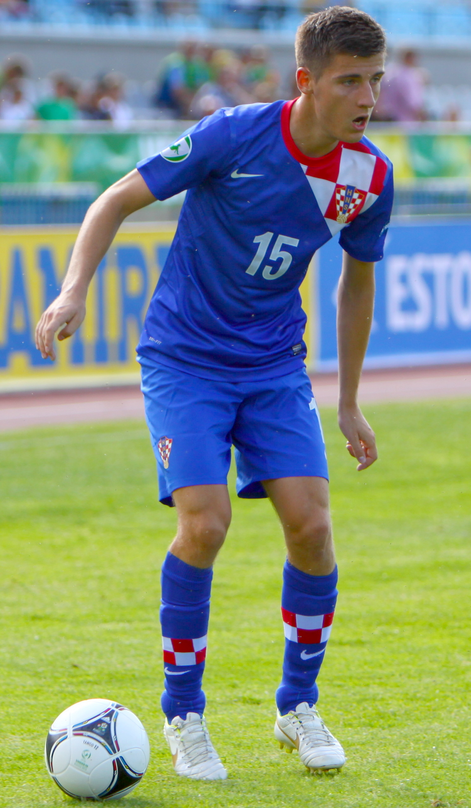 Danijel Miškić playing for Croatia U-19